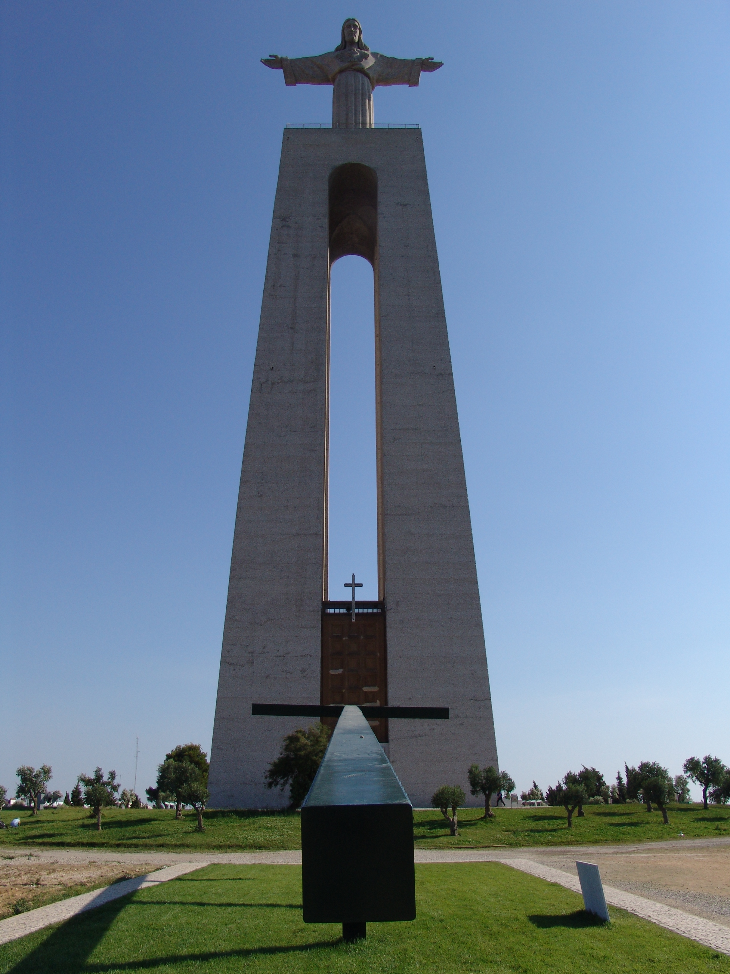 Cristo Rei em Almada e a Cruz Alta. Fotografia de Carlos Botelho.